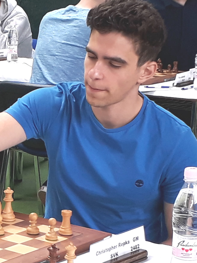 Christopher Repka, Runde 4 Mitropa Cup 2019 in Radenci.